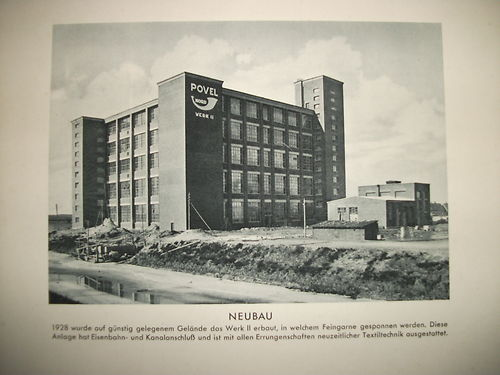 Nordhorn